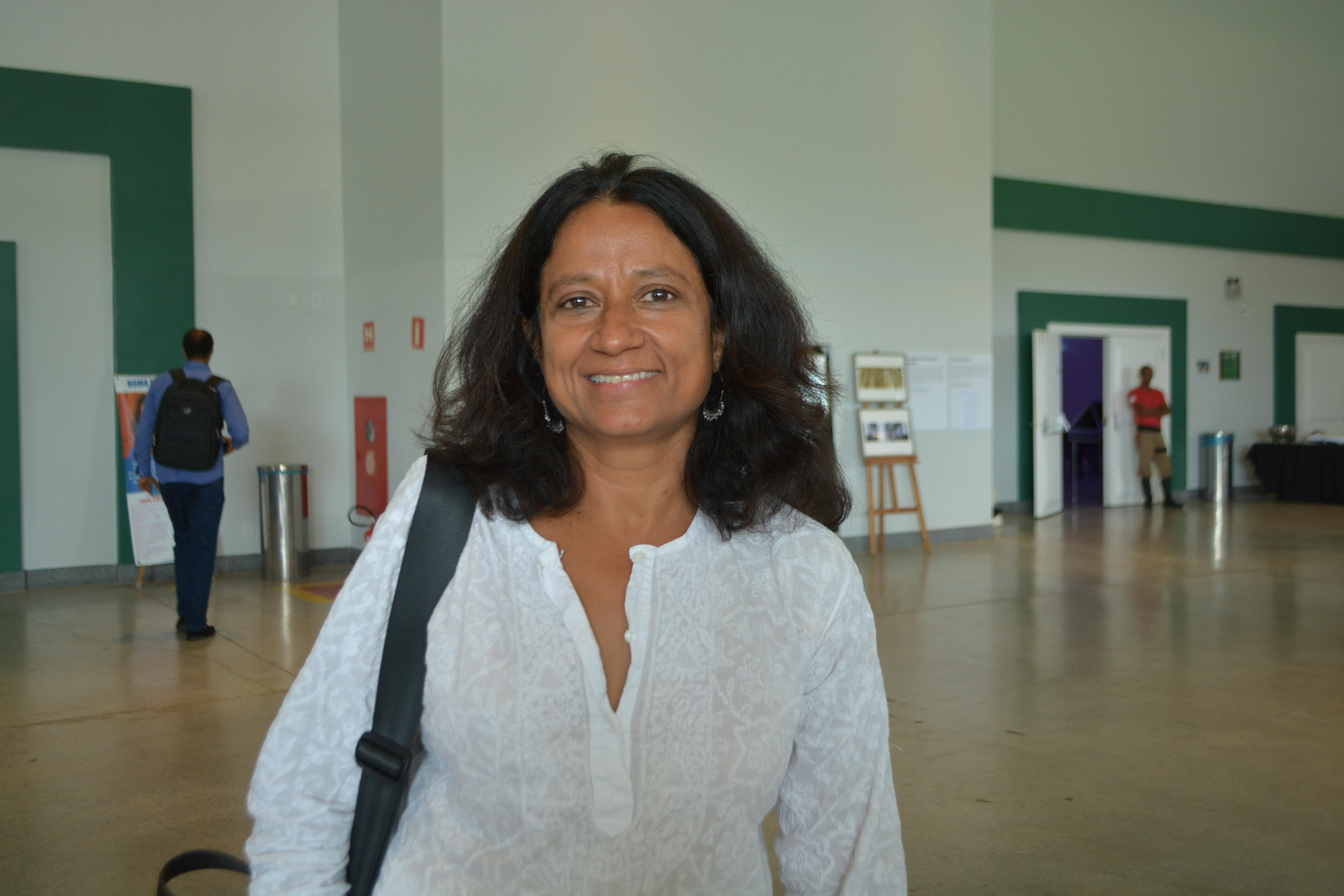 Feminista en AWID 2016